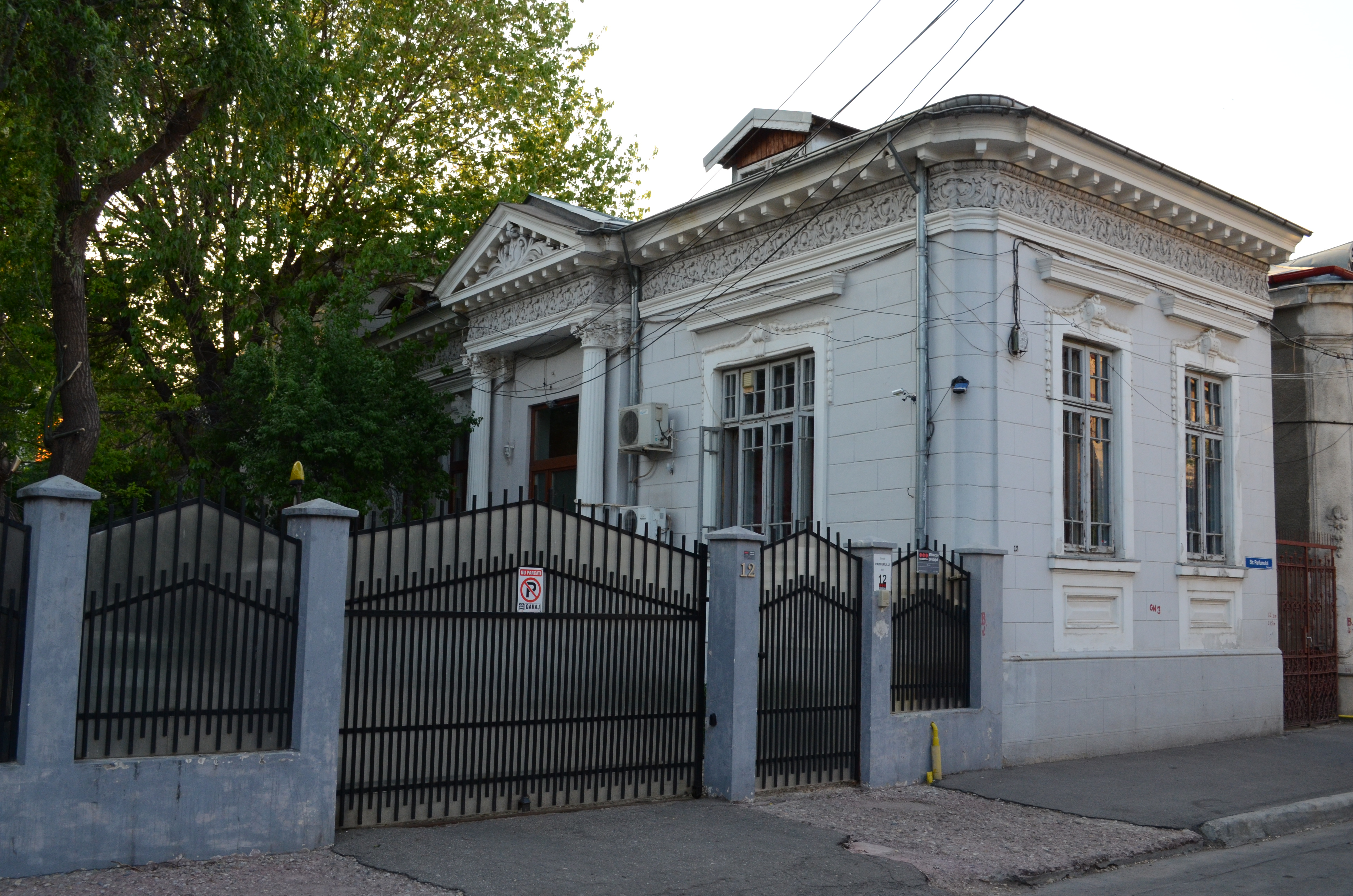 Casă, Strada Parfumului nr. 12, Sector 3, București